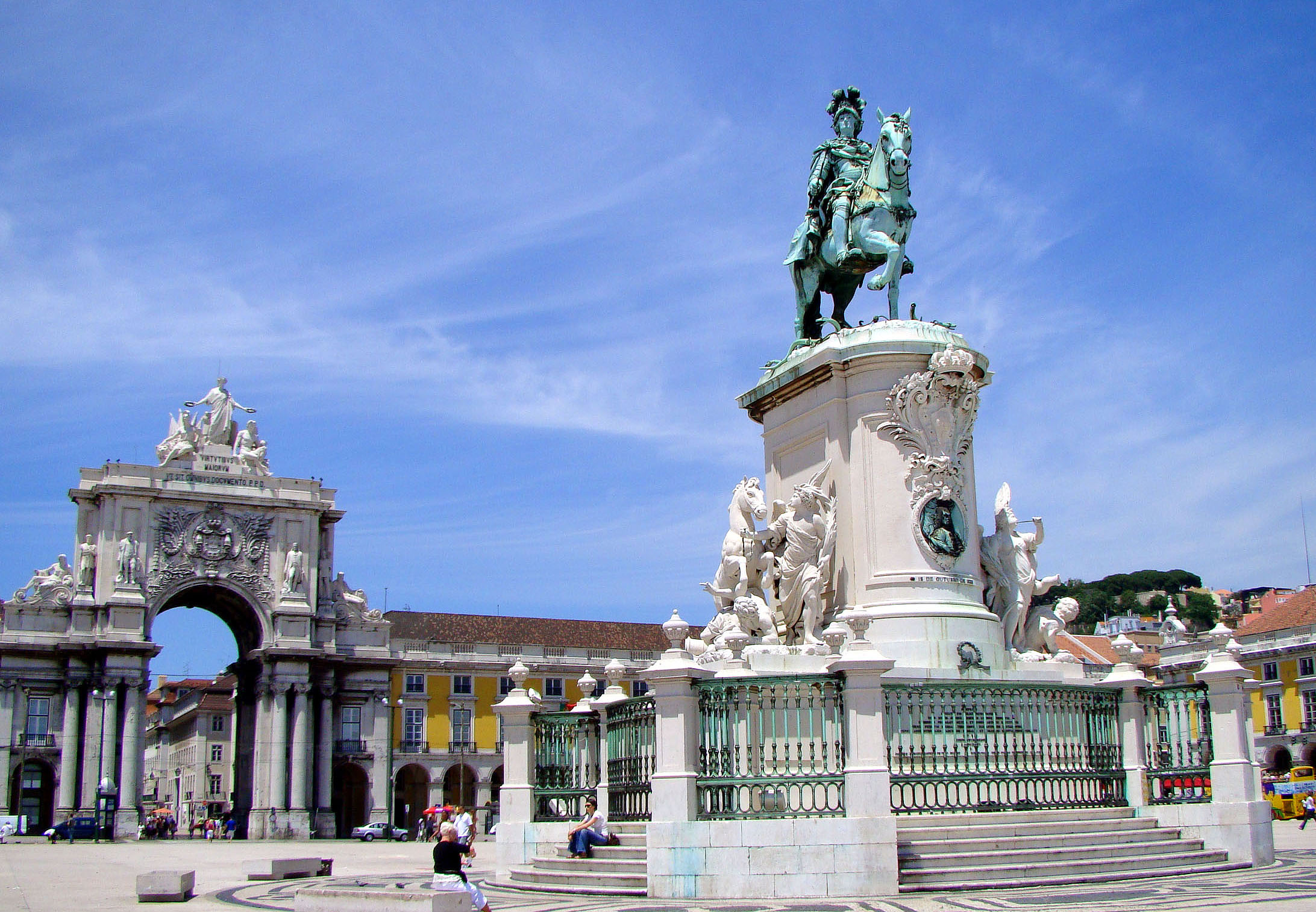 Lisbon 022